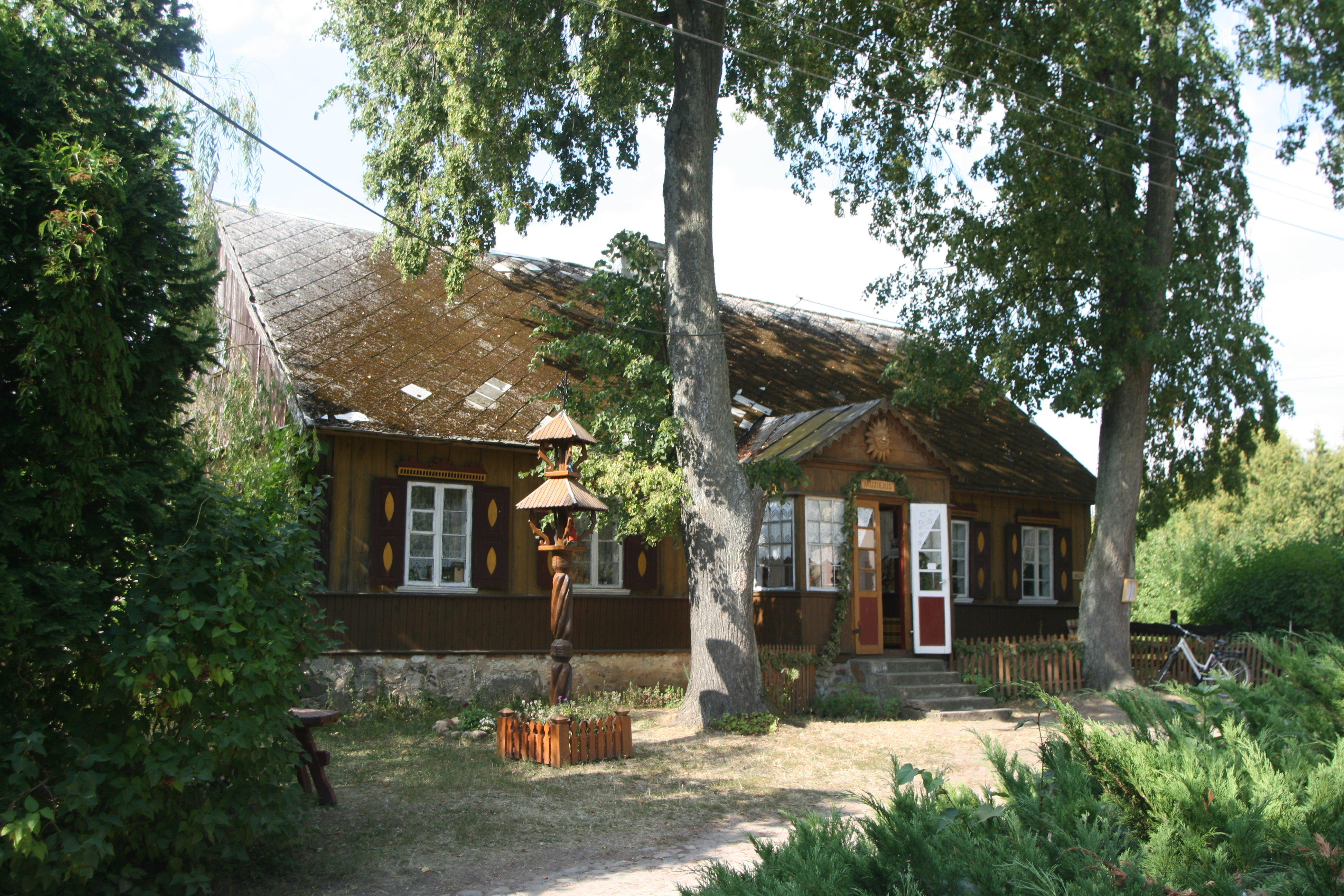 Puńsk, Poland